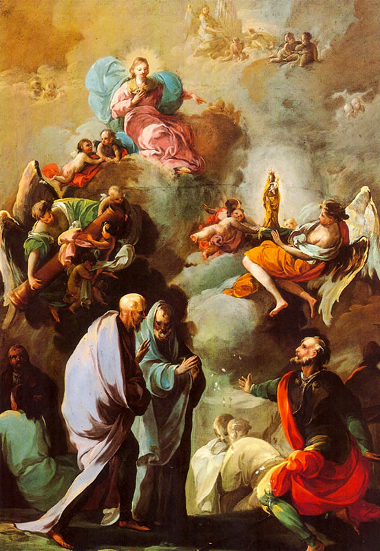 Aparición de la Virgen del Pilar a Santiago y a sus discípulos zaragozanos.title QS:P1476,es:"Aparición de la Virgen del Pilar a Santiago y a sus discípulos zaragozanos." label QS:Les,"Aparición de la Virgen del Pilar a Santiago y a sus discípulos zaragozanos."